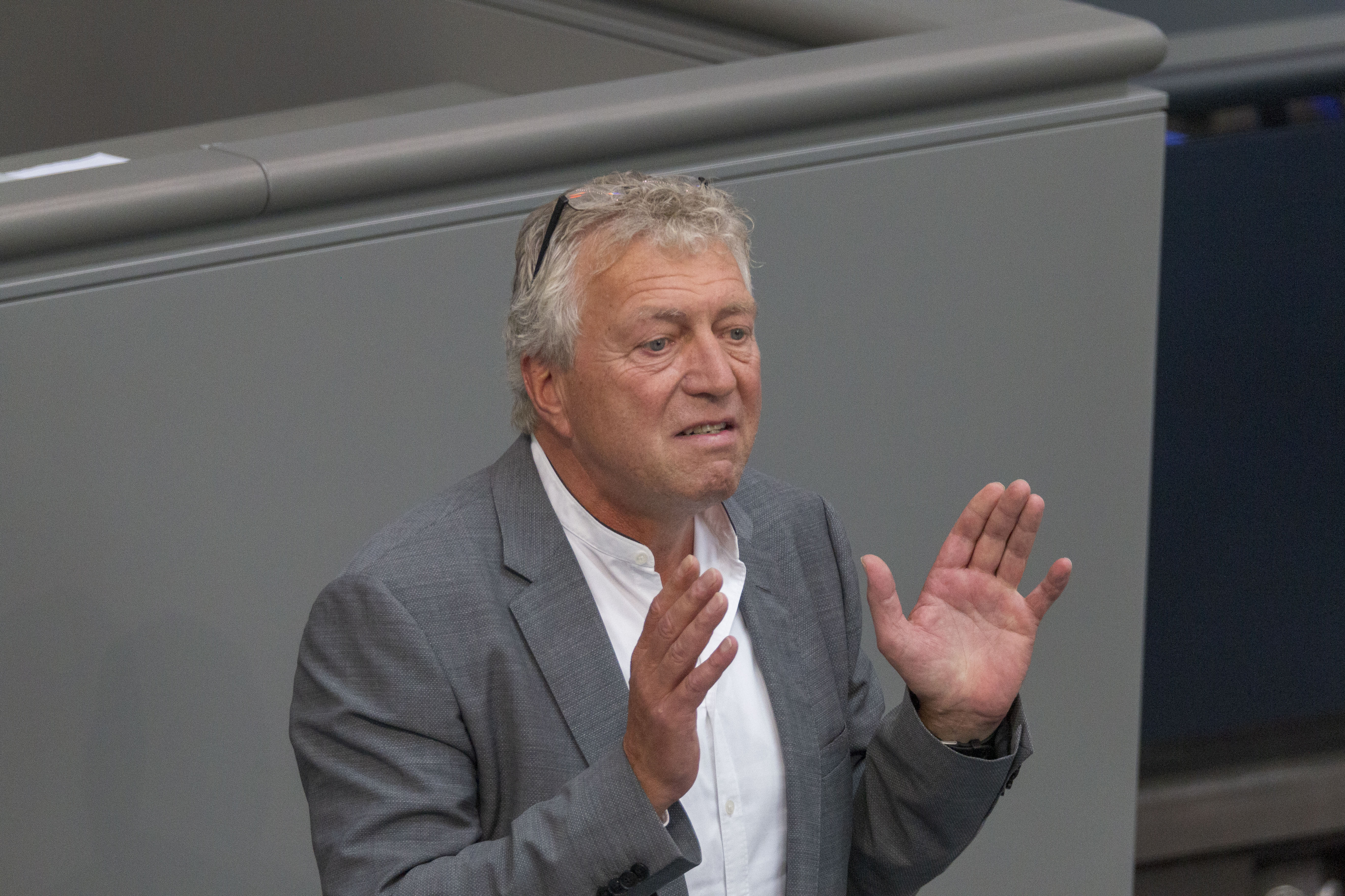 Rainer Spiering, Bundestagsabgeordnete der SPD während der Plenarsitzung des Deutschen Bundestages am 2. Juli 2020 in Berlin.